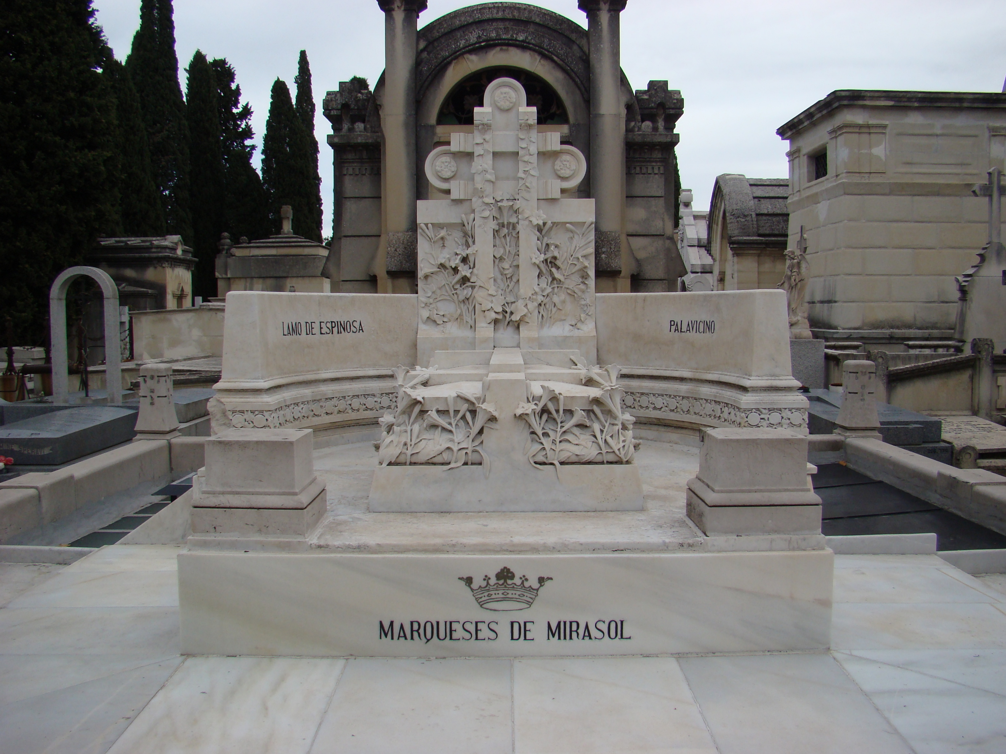 3ª sección del patio de Santa Gertrudis. Detrás, el panteón de la familia Peña Romillo (Arquitecto José Astiz Bárcena, 1901). "sobresalen los siguientes mausoleos ... el de los marqueses de Mirasol (familia Palavicino-Lamo de Espinosa), proyectado en 1911 por Plácido Francés, con exquisita decoración floral modernista y amplia cripta neogótica" (EL CEMENTERIO DE LA SACRAMENTAL DE SAN JUSTO: HISTORIA Y ARQUITECTURA Por CARLOS SAGUAR QUER) DSC00403